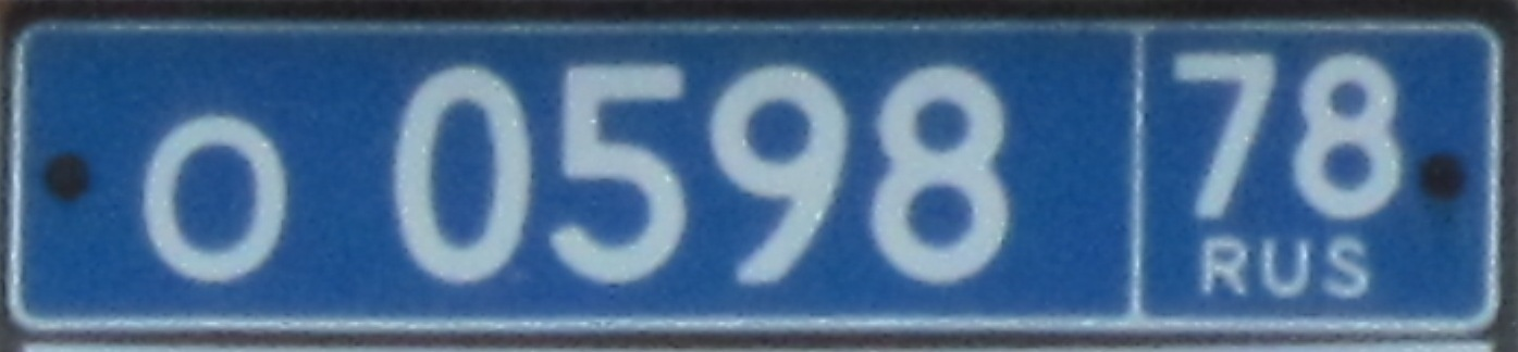 Licenseplate Russia